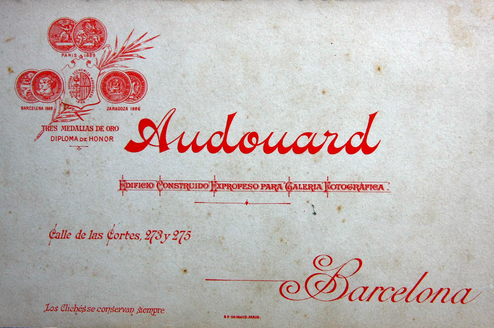 Revers d'una foto de Pau audouard